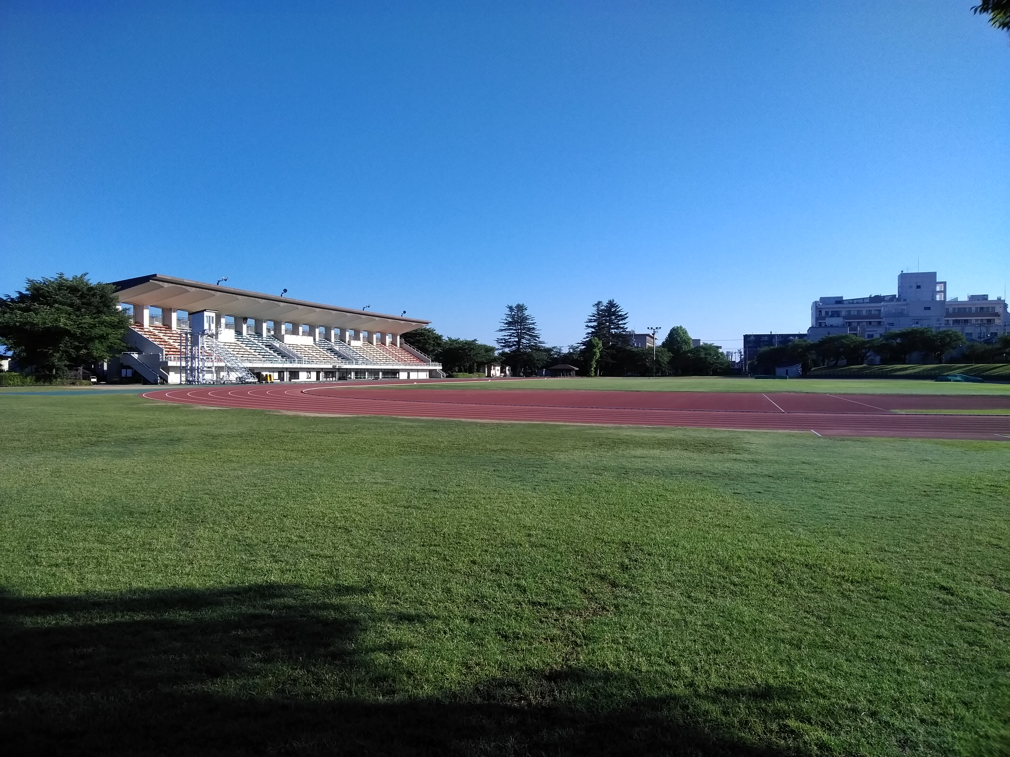 金沢市営陸上競技場